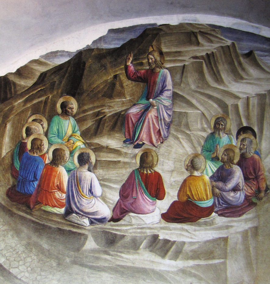 Fresco im Markuskloster in Florenz